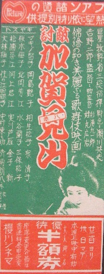 『敵討加賀見山』、1929年公開時のフライヤー